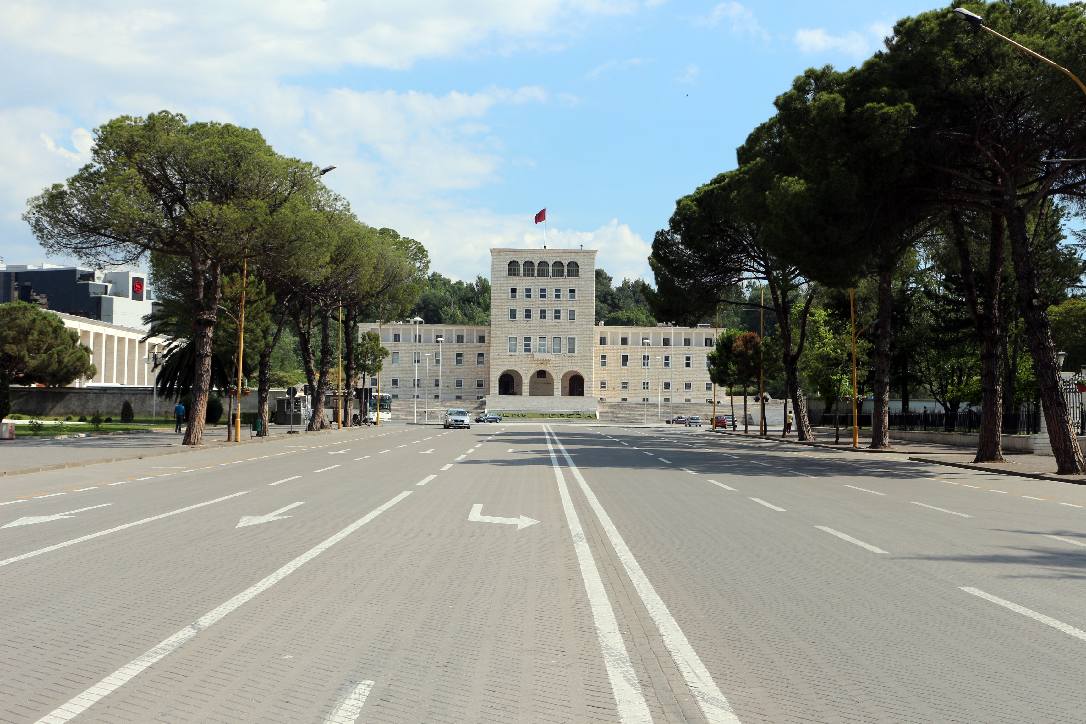 Universiteti I Tiranes